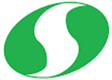 출처: 나무위키 (Namu Wiki)